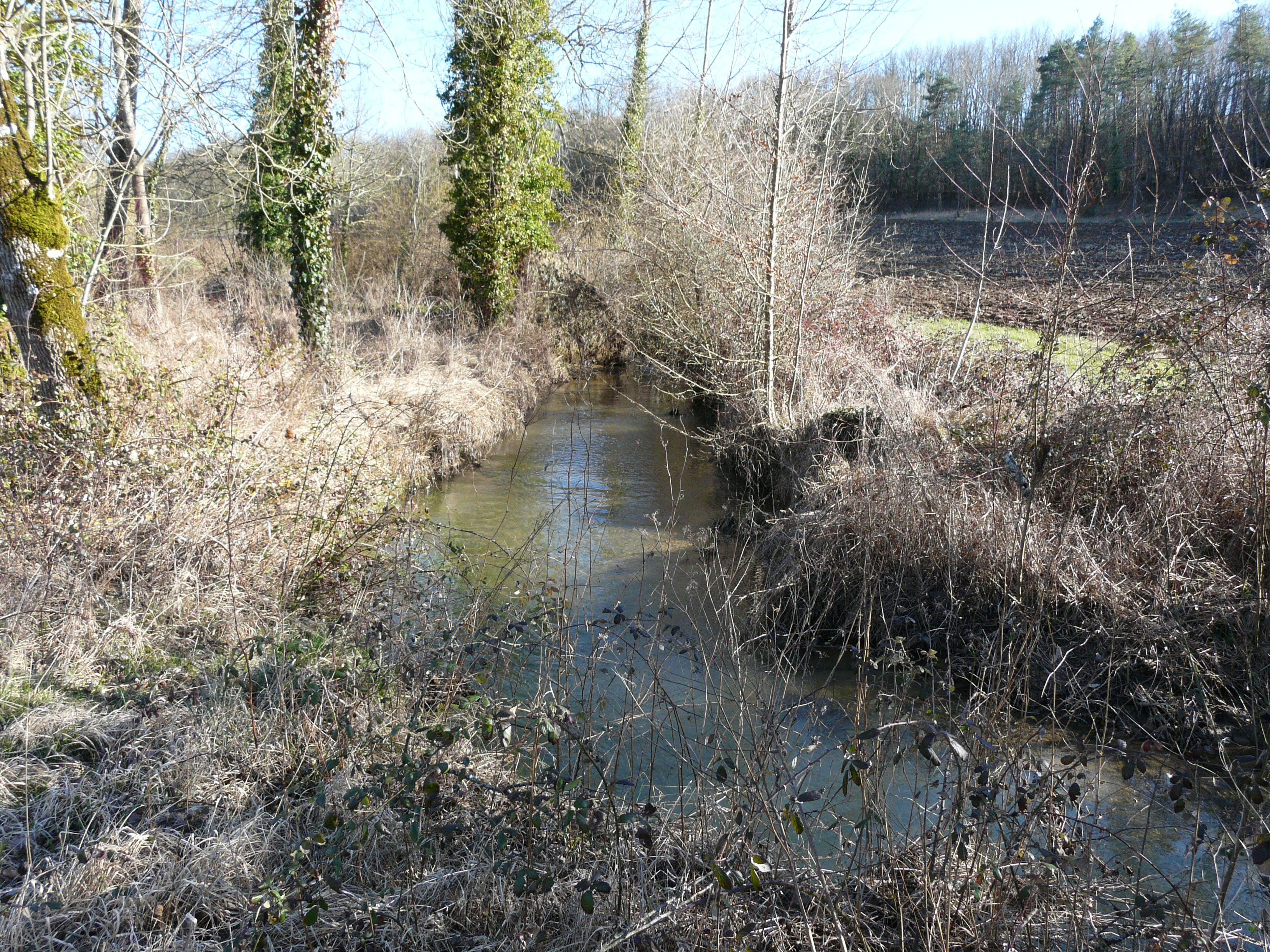 La Donzelle près de la Coufénerie, Dordogne, France. Vue prise vers l'amont.